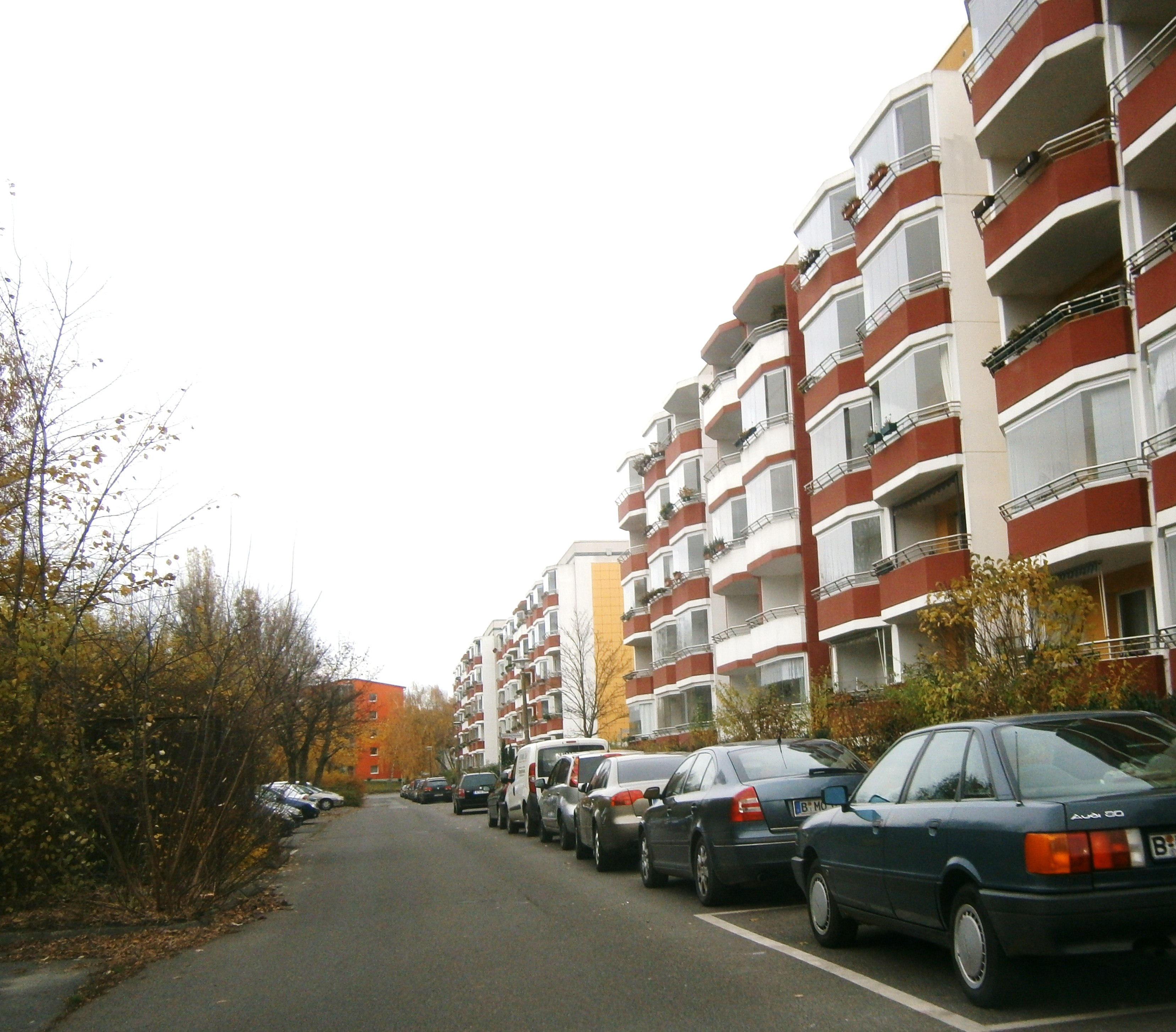 Karower Chaussee (hier die Zufahrtsstraße parallel zur Chaussee ist eine Straße im Berliner Ortsteil Buch.